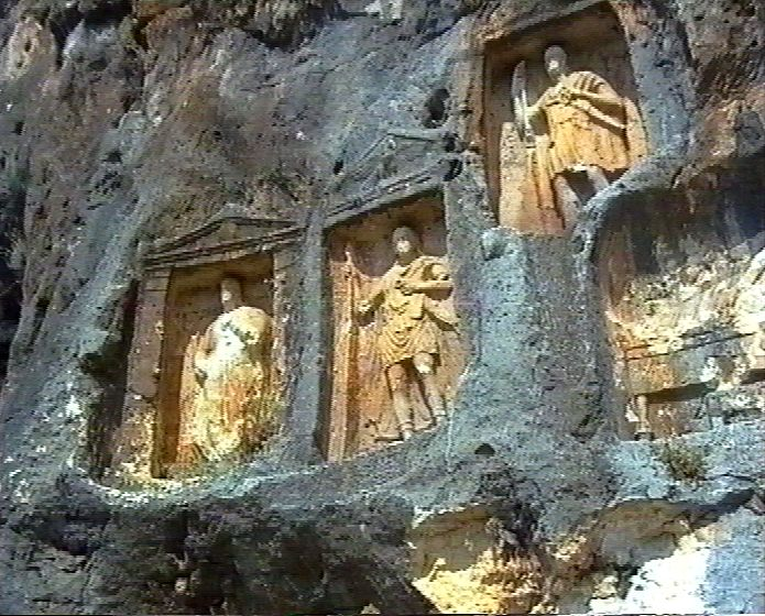 Adamkayalar, römische Grabreliefs bei Kizkalesi, Südtürkei